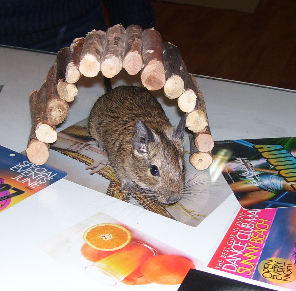 Дегу, Octodon degus